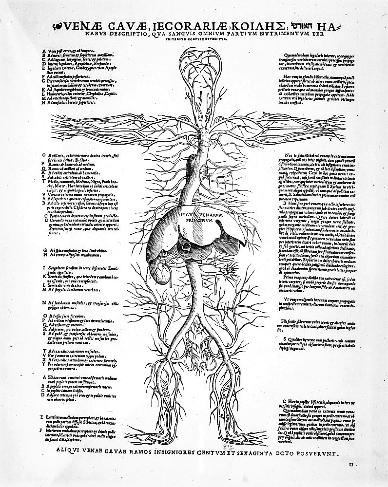 Venae cavae Anatomie. Circulation (sang) . 19e siècle Auteur de l'ouvrage : VÉSALE, André / VESALIUS, Andreas Ouvrage : Tabulae anatomicae sex Edition : Londres: sir William Stirling Maxwell, 1874